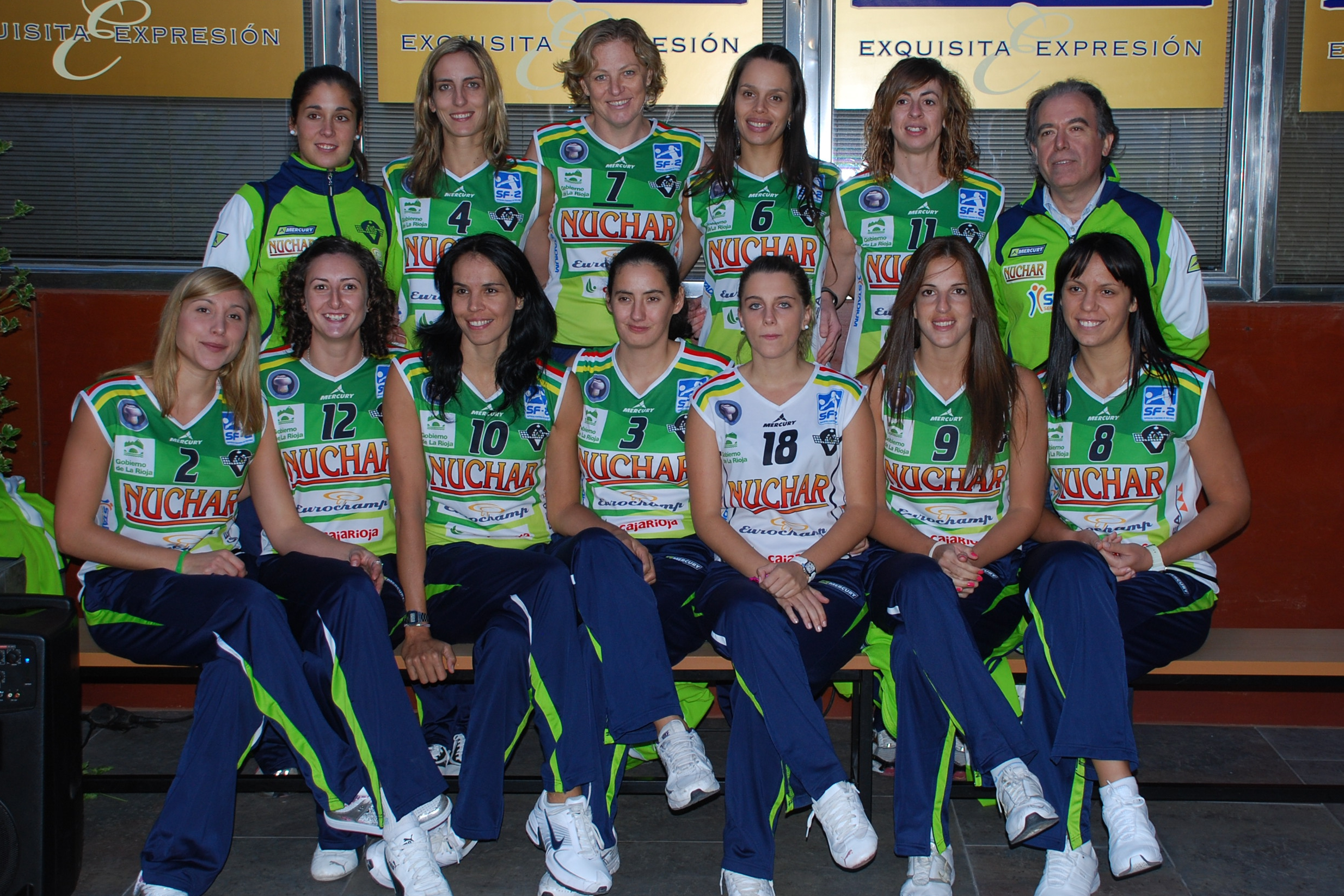 Presentación del Club Voleibol Murillo en la temporada 2010-2011